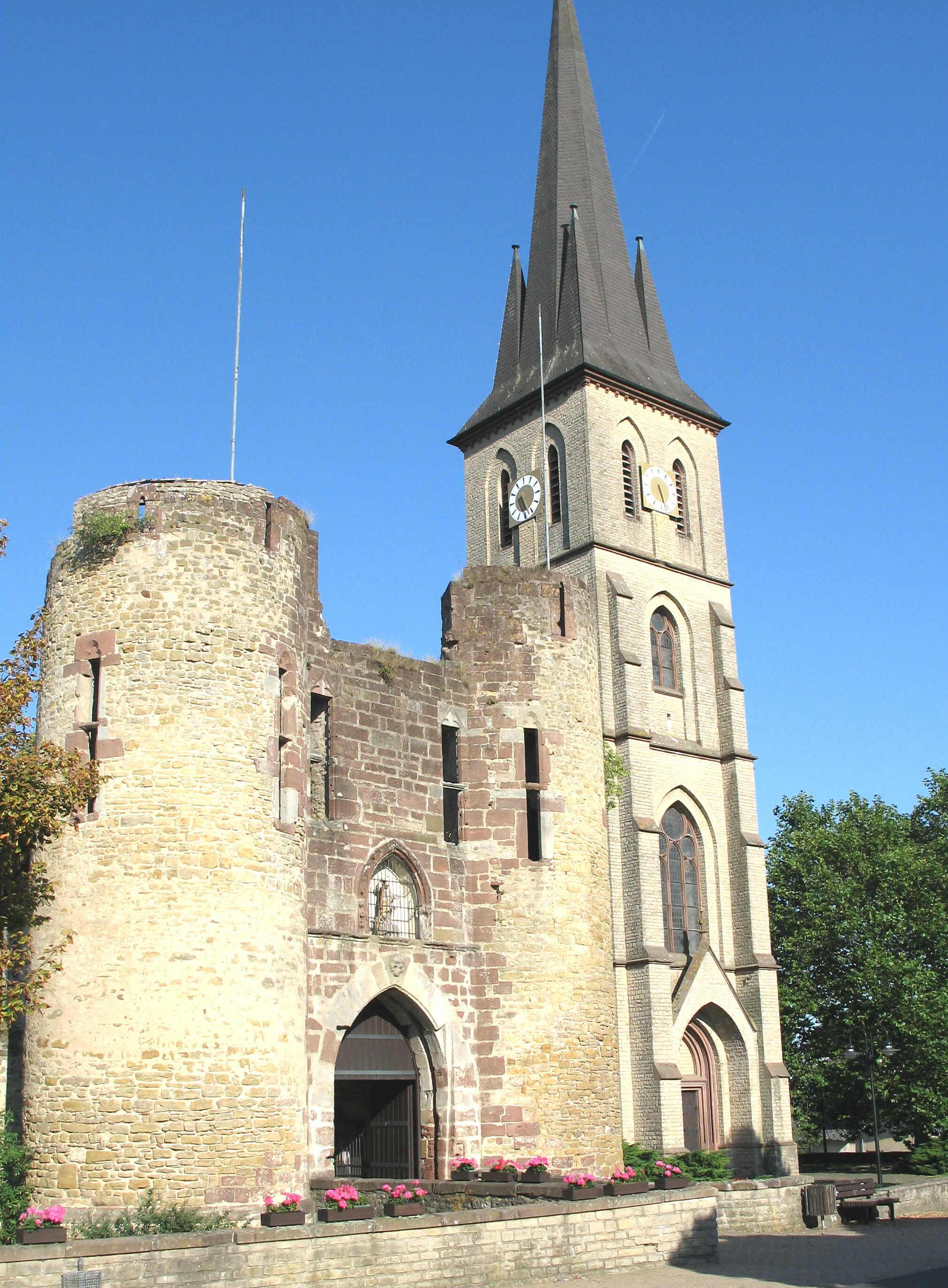 D'Kierch an d'Buerg vu Welschbillig